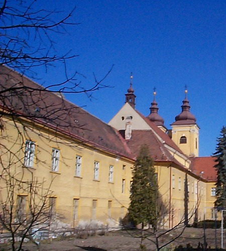 Budova jezuitského kláštora v Trnave